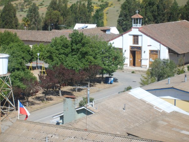 Iglesia Católica de Sauzal